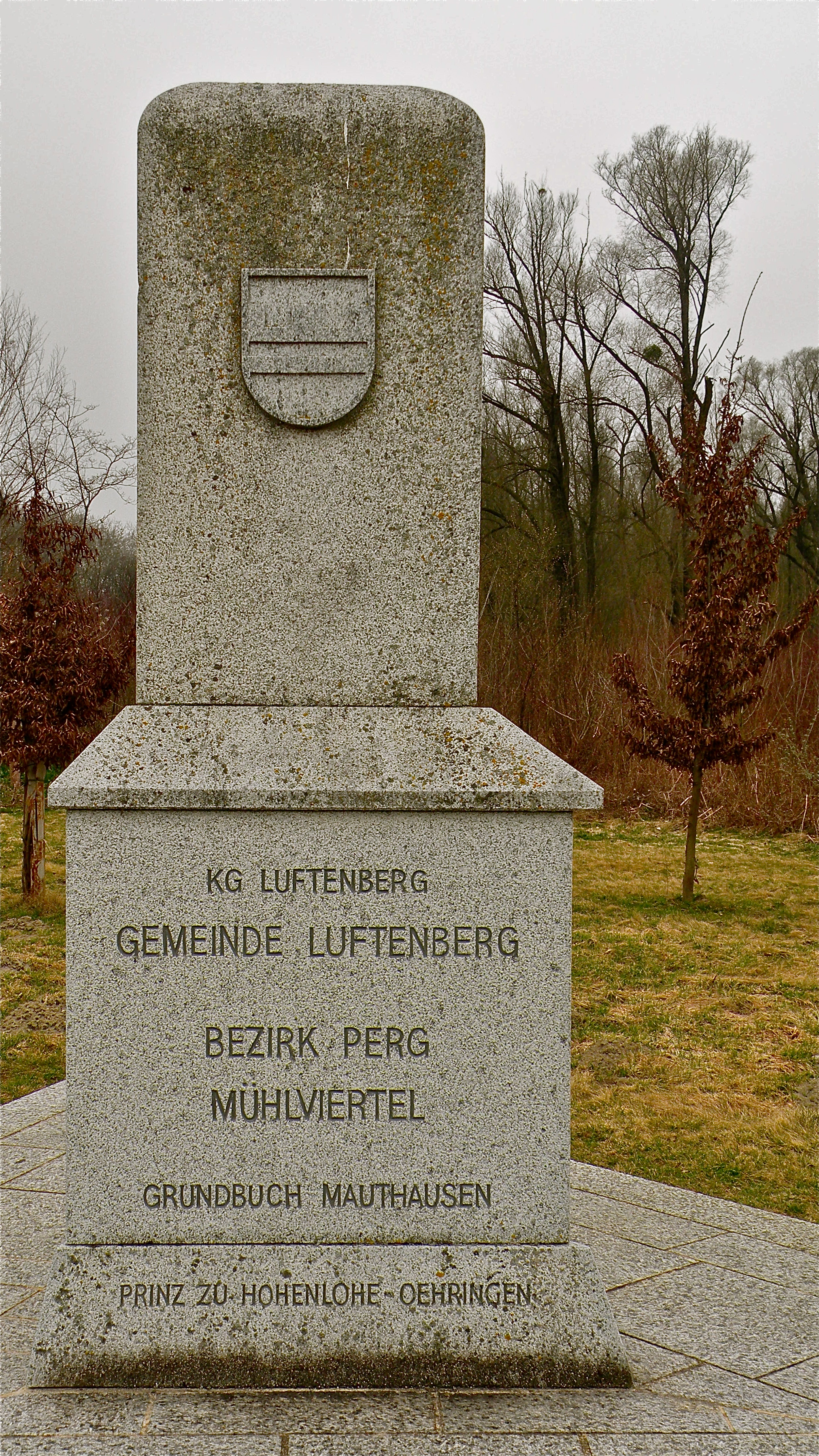 Dreibezirkestein beim Ausee in der Marktgemeinde Luftenberg an der Donau im Bezirk Perg in Oberösterreich